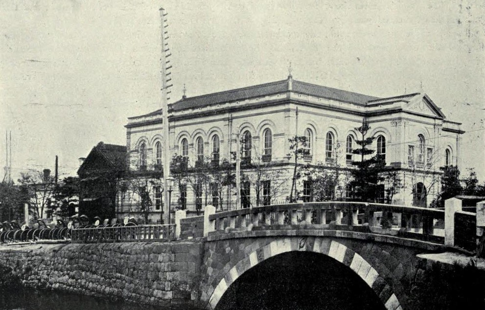 第十五銀行